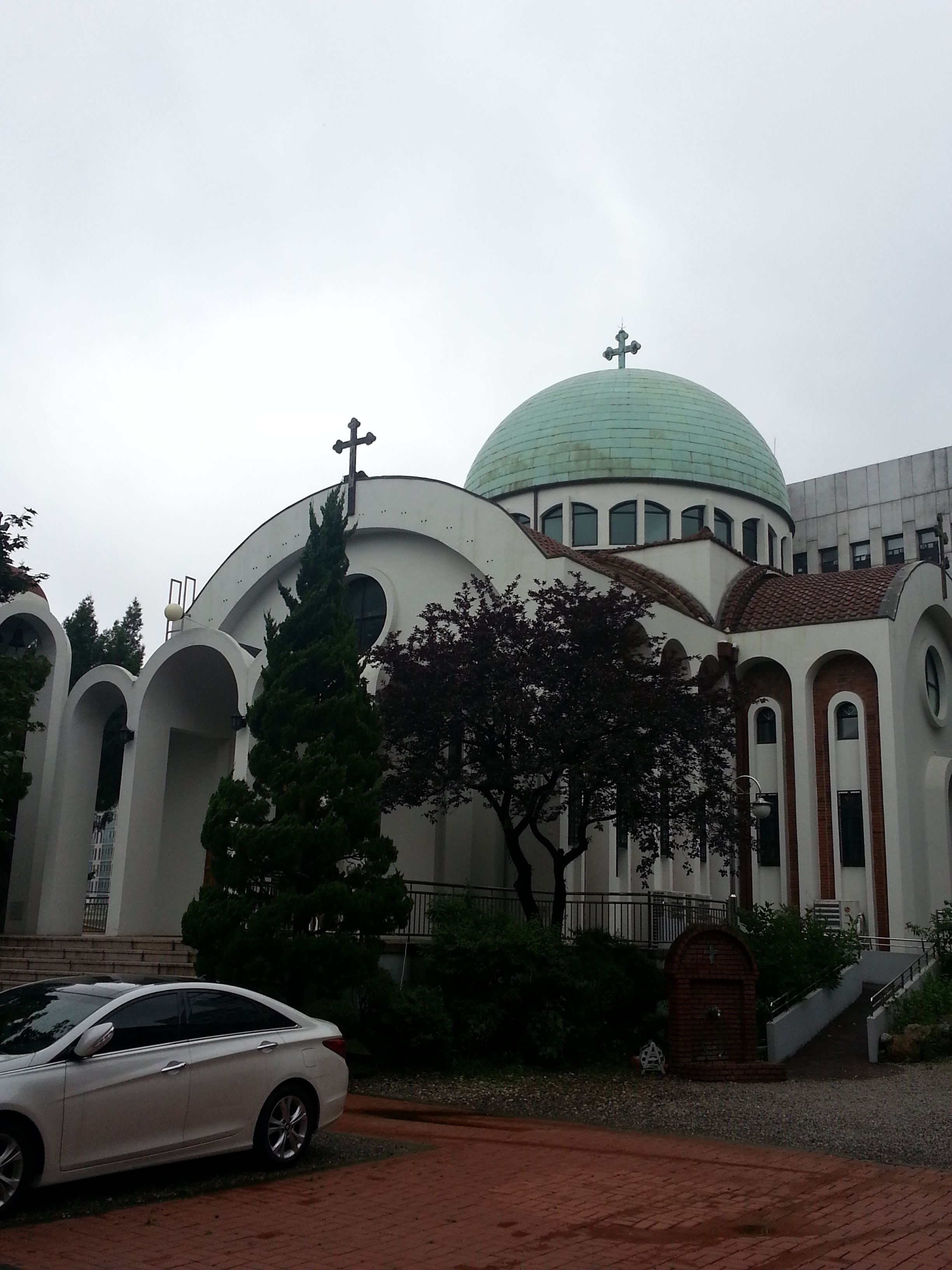 ソウル聖ニコラス大聖堂正面